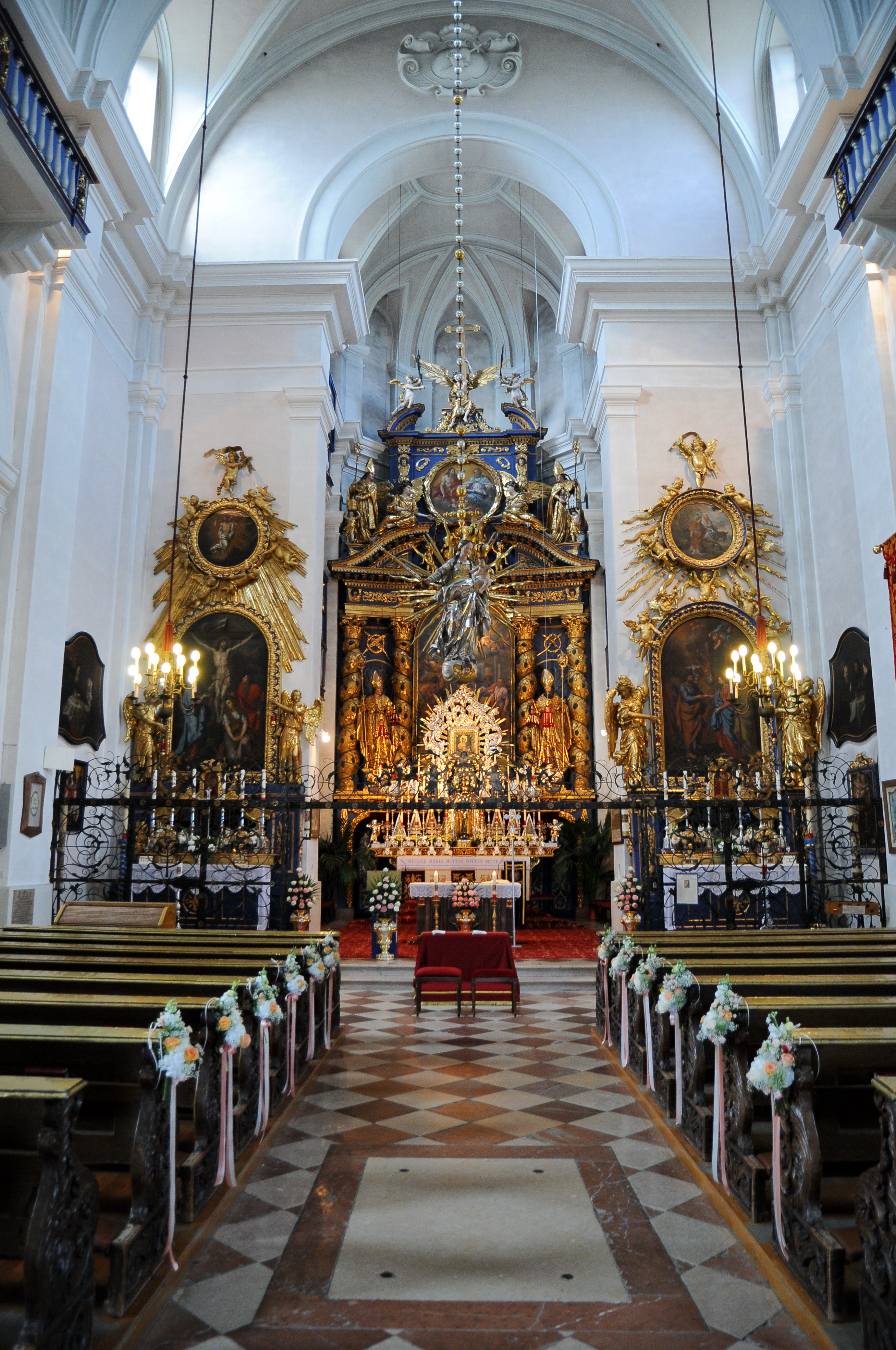 Maria Plain ist ein römisch-katholischer Wallfahrtsort in der Gemeinde Bergheim im Norden des österreichischen Bundeslandes Salzburg. Die Wallfahrtsbasilika Mariæ Himmelfahrt (15. August) auf dem Plainberg nördlich von Salzburg bildet mit den sie umgebenden Kapellen und Gebäuden ein geschlossenes barockes Ensemble. In der Wallfahrtskirche wird das Gnadenbild Maria Plain „Maria Trost“ verehrt.